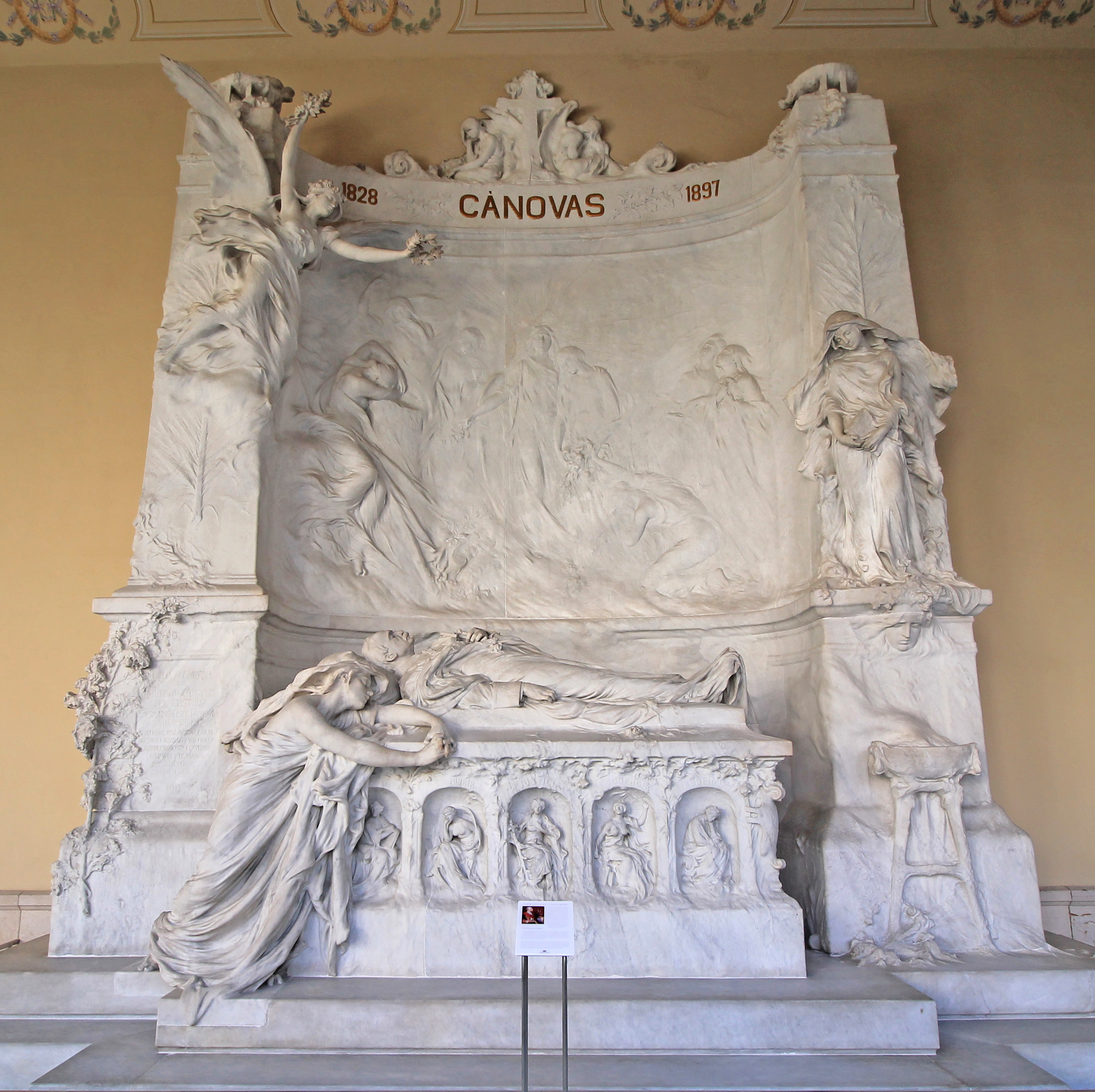 Mausoleum of Antonio Cánovas del Castillo.